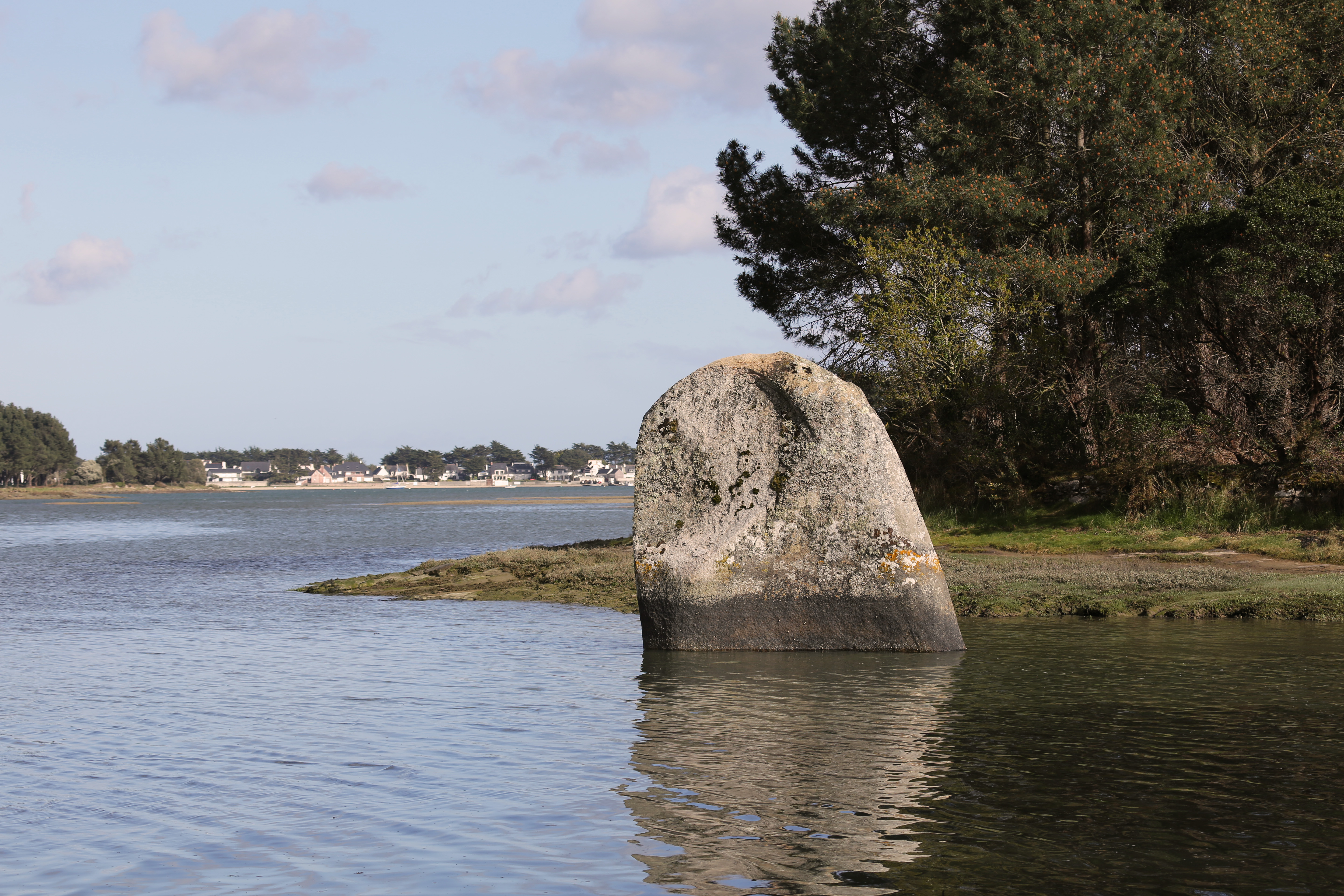 Menhir de Penglaouic, Loctudy. localisation: 47,853458 / -4,193006 Partiellement immergé à marée haute, il sépare deux communes, celles de Pont-l'Abbé et de Loctudy. Au fond, on aperçoit l'Île-Tudy .